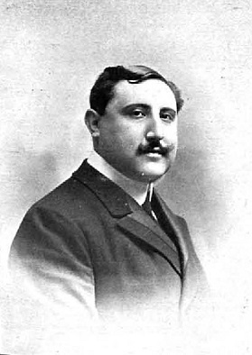 Retrato de Gabriel Maura Gamazo, obra del fotógrafo Kaulak, recogido en la revista española La Ilustración Española y Americana.